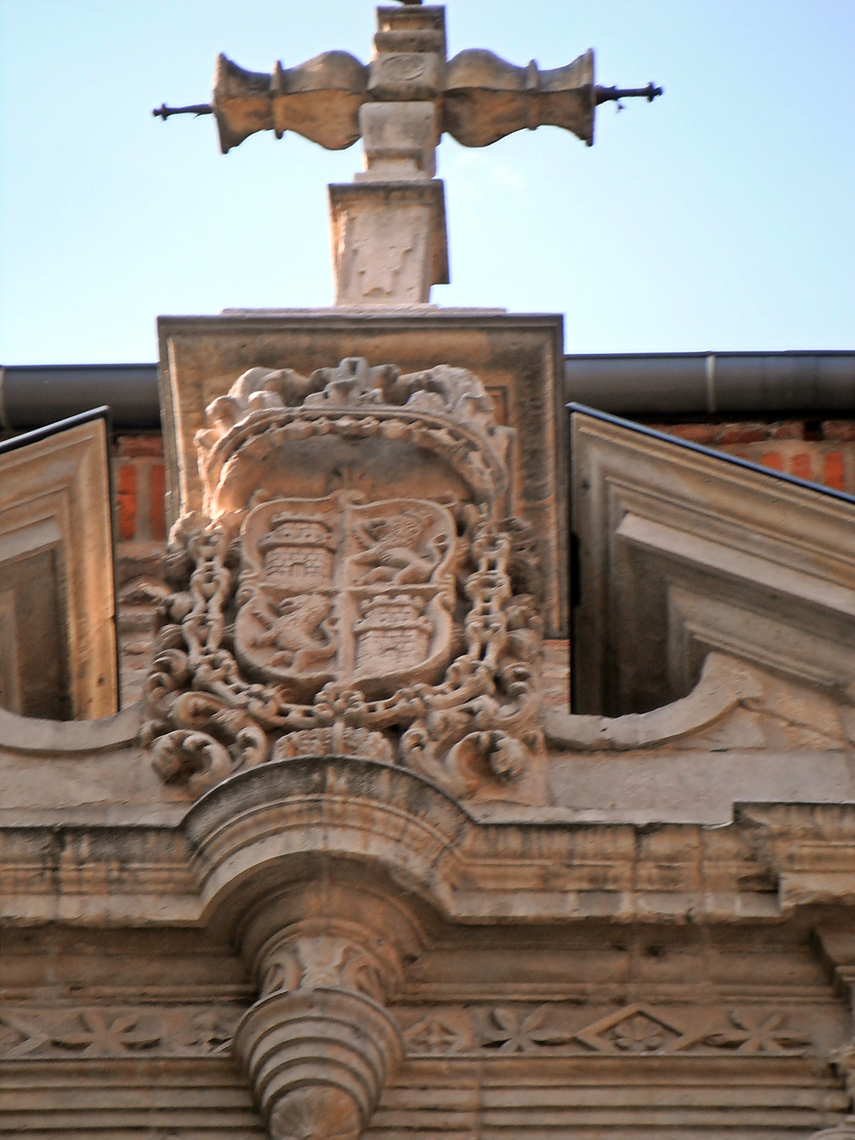 Convento de las Comendadoras de Santa Cruz en Valladolid